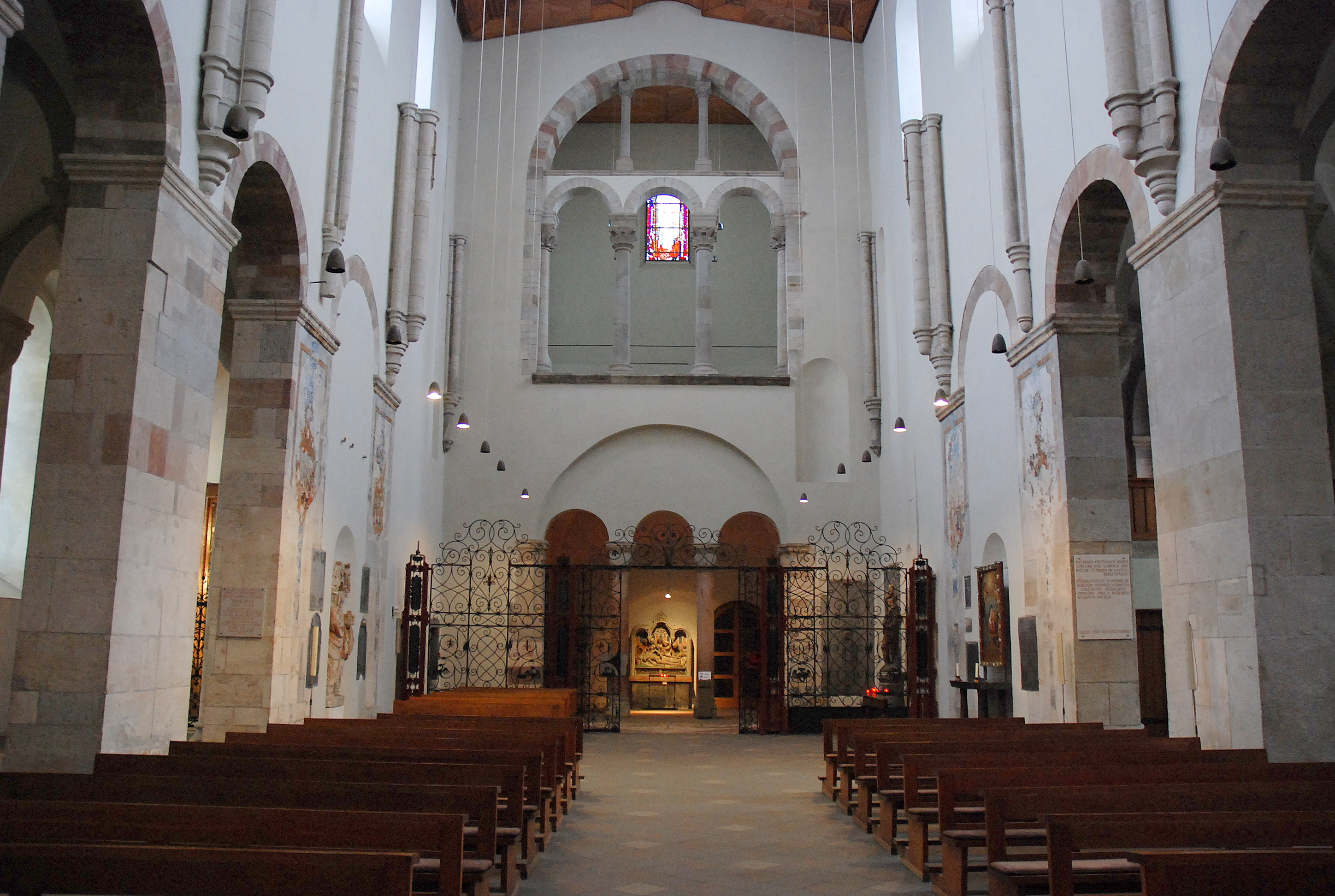 Achterzijde vanhet schip van de kerk Sint-Maria in het Kapitool te Keulen (Duitsland)